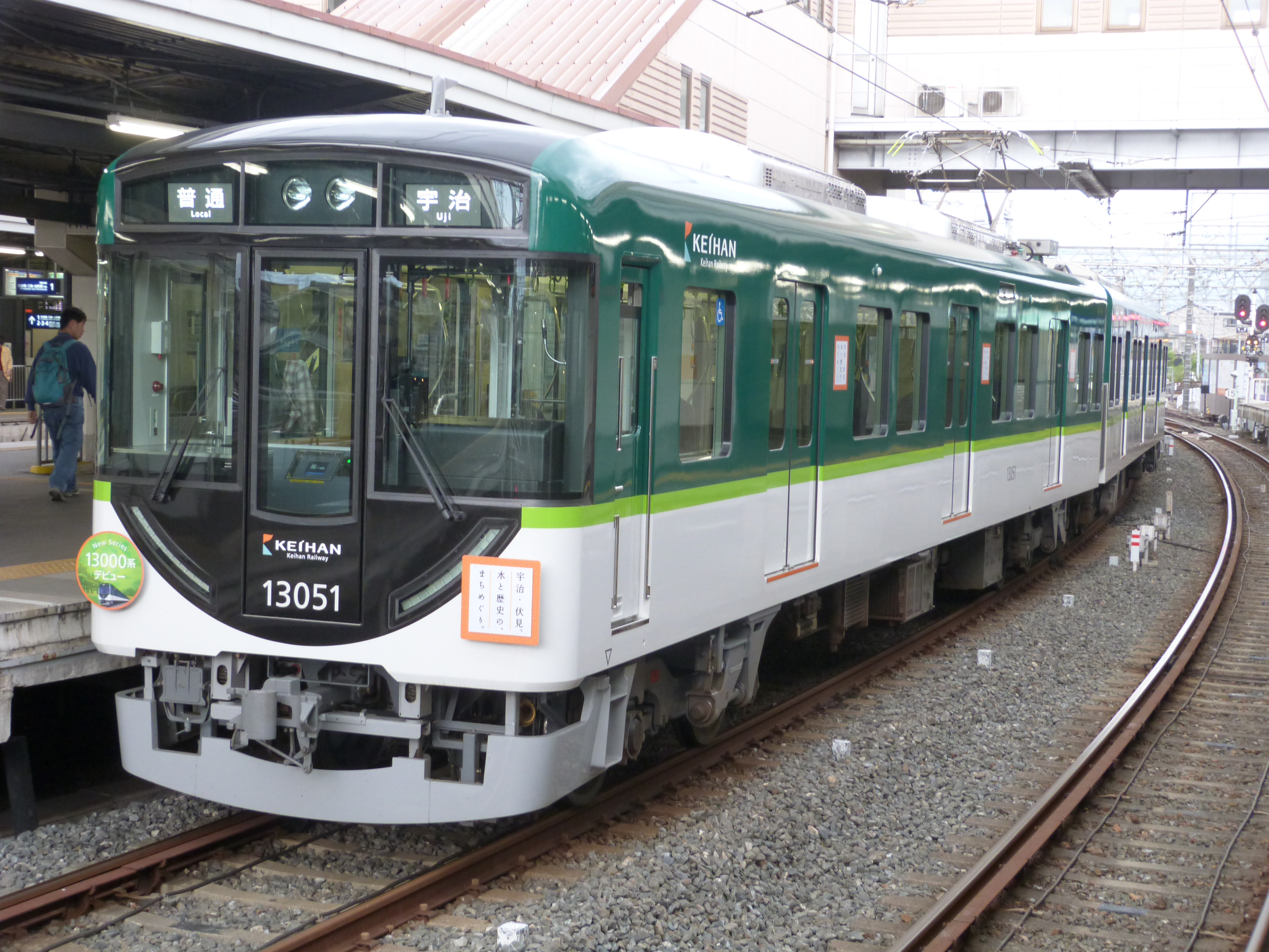 京阪中書島駅にて13051号車を自己撮影。